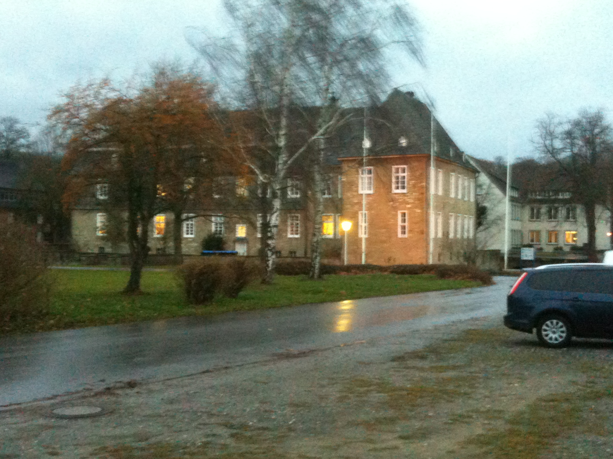 Haus Düsse, Bad Sasssendorf